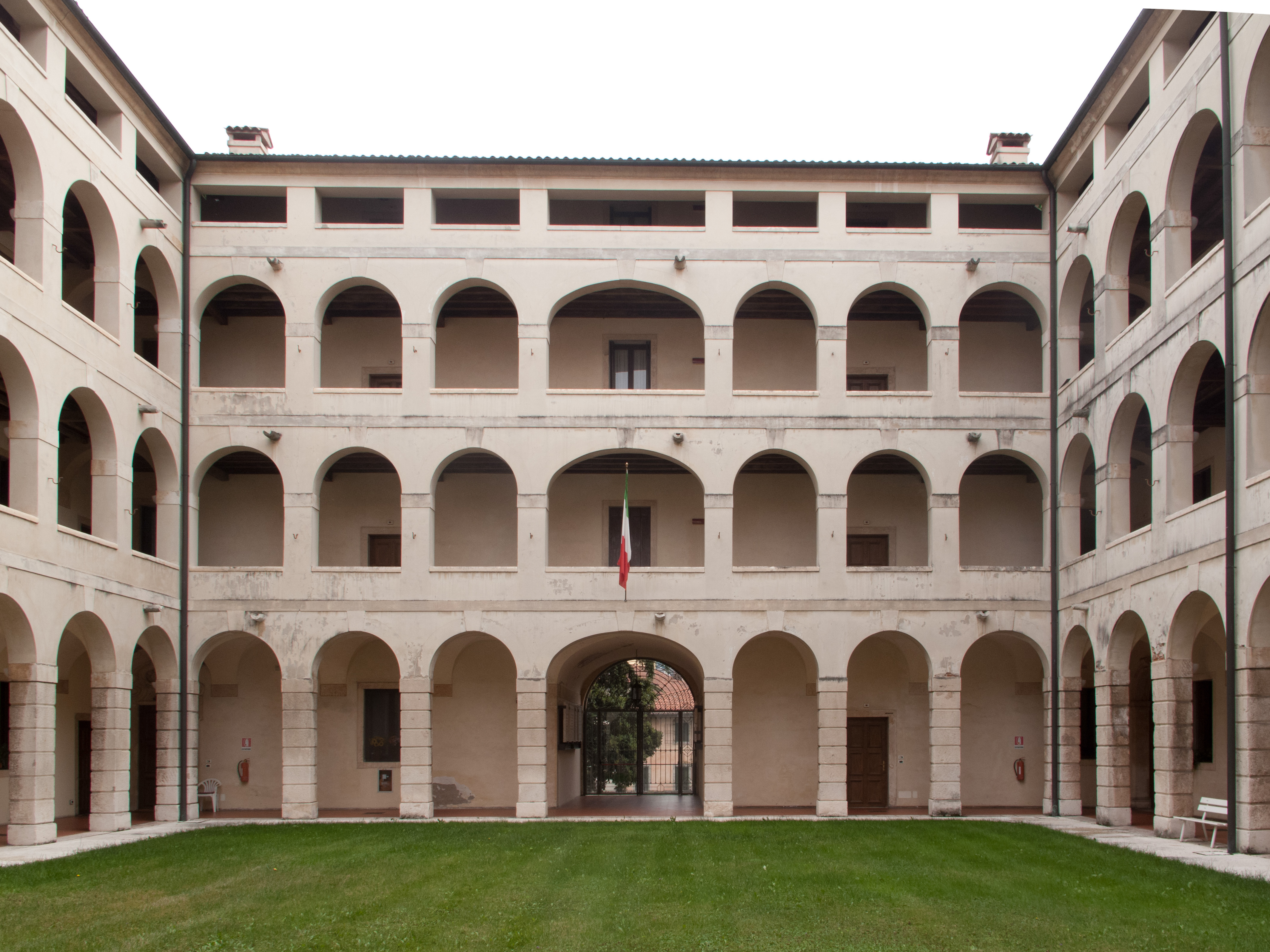 Cortile interno